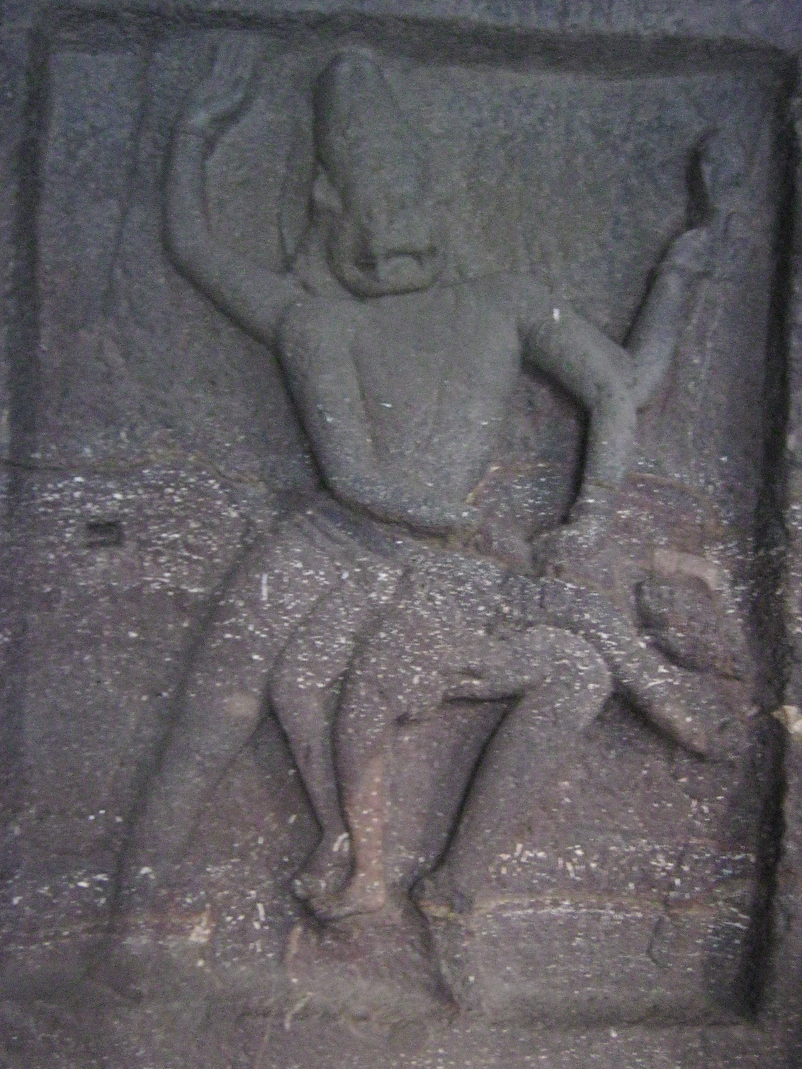 நரசிம்மன் இரணியனைக் கொல்லும் காட்சி